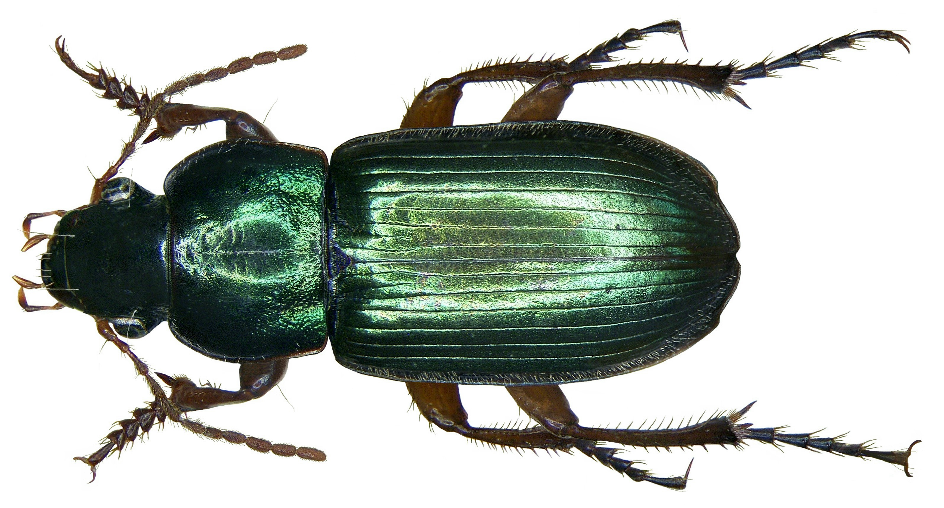 Familie: Carabidae Größe: 9-12 mm Verbreitung: transpalaearktisch, eingeschleppt in Nordamerika und Australien Ökologie: auf feuchten Humusböden Fundort: Helvetia, Graubünden, Ilanz leg.det. U.Schmidt, 2004 Foto: U.Schmidt, 2008